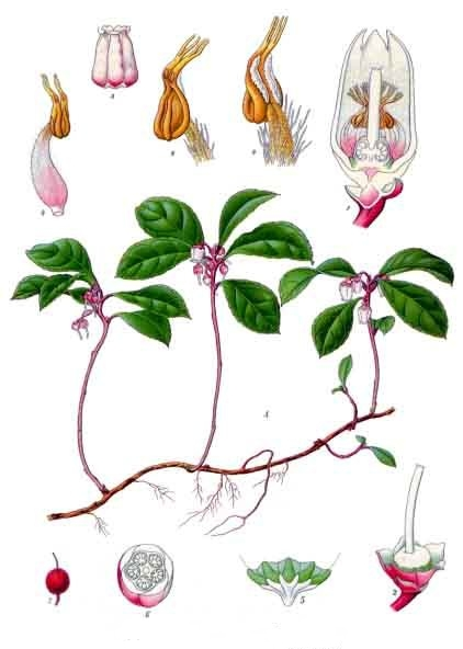 Scheinbeere. A blühende Pflanze. 1 Blüte im Längsschnitt, 2 Kelch mit Pistill, 3 Korolle von aussen, 4 Staubblätter, 5 die doppelte Scheibe, 6 halbreife Frucht im Querschnitt, 7 reife Frucht. A und 7 in natürlicher Grösse, 1, 2, 3, 4, 5, 6 stark vergrössert.